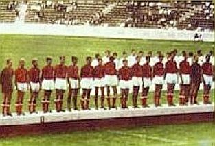 La Hongrie, vice-championne olympique de football en 1972, 'Munchen 72', Panini figurina n°44.